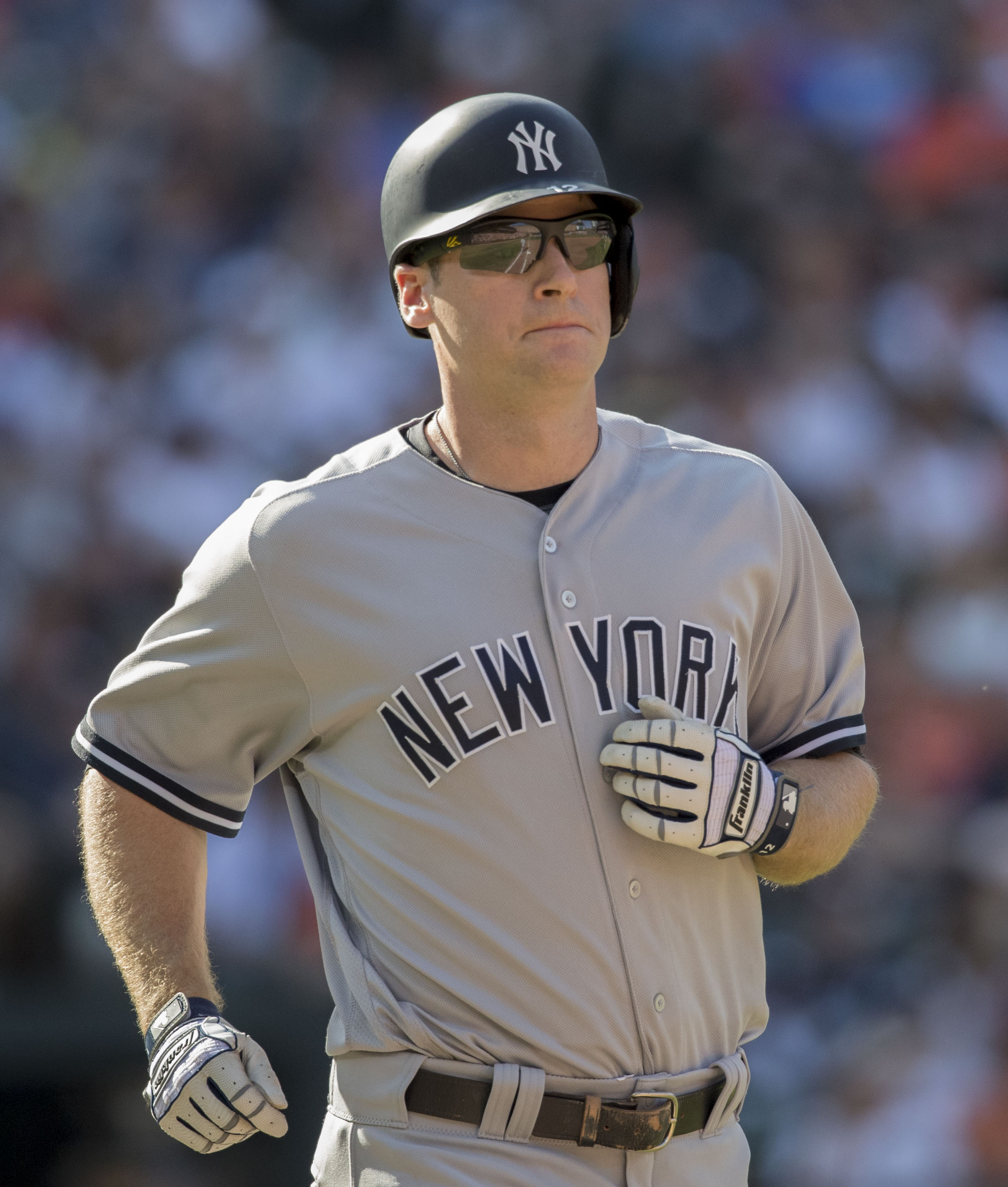 Yankees at Orioles 9/4/17